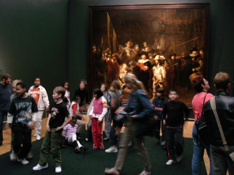 Die Nachtwache im Rijksmuseum (Foto: Thomas Frison, 2005)